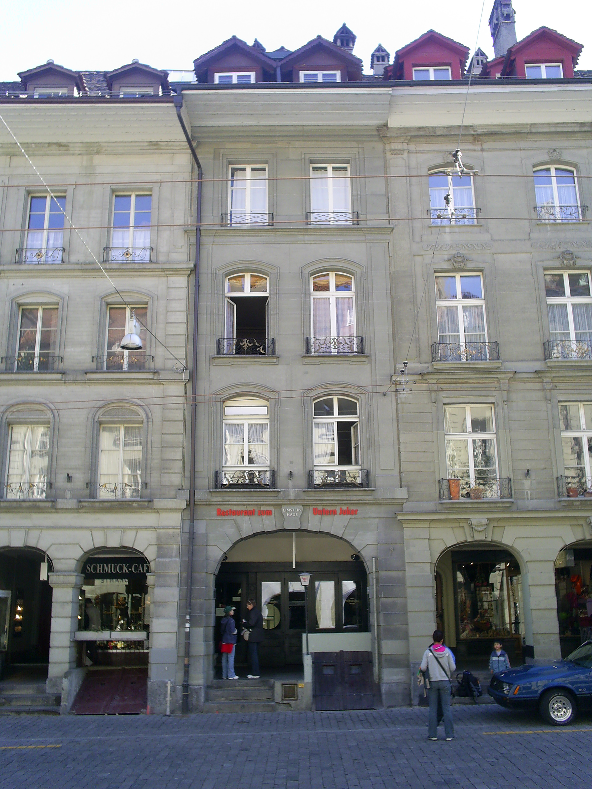 Casa de Einstein en Berna vista de frente